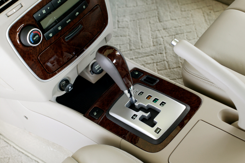 Hyundai Sonata interior.